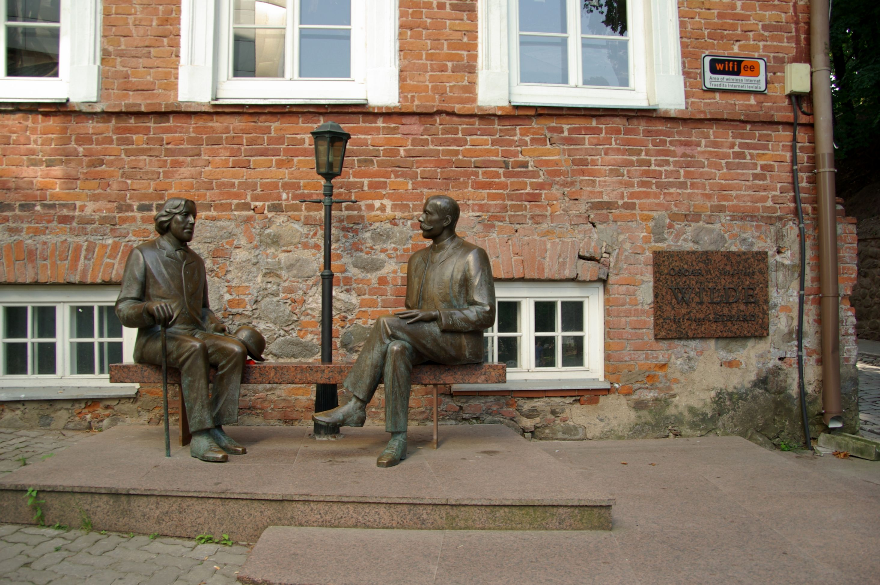 Oscar Wilde'i ja Eduard Vilde skulptuur Vallikraavi täna ääres